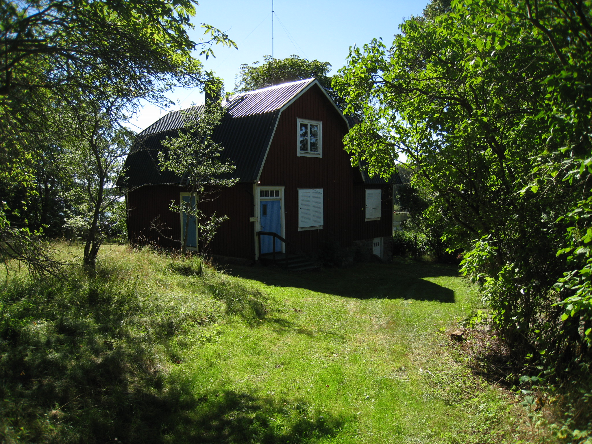 Torpet Sandudden ligger invid Skäftingesundet vid Mälaren, där broarna går över till Skäftingeholmen. Sandudden ligger i Görvälns naturreservat i Järfälla kommun, Stockholms län. Sedan 1984 uthyrs Sandudden till konstgård med café. Huset med vy från öster.